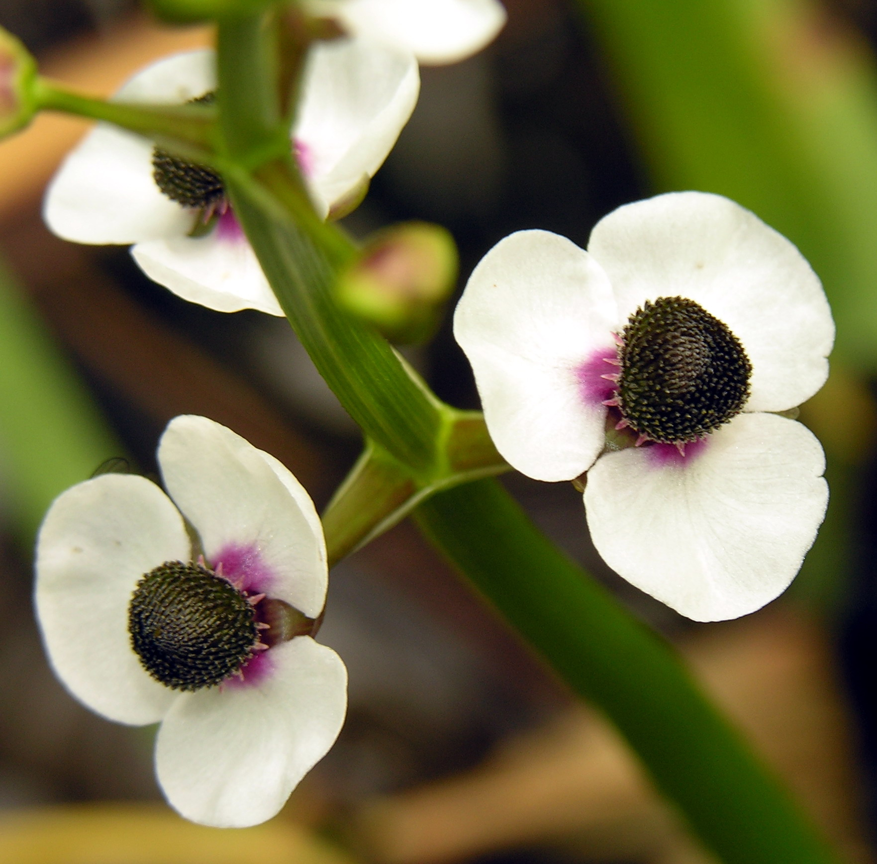 Strėlialapė papliauška (Sagittaria sagittifolia), žiedai Šeima. Dumblialaiškiniai (Alismataceae) Foto: Algirdas, 2006 m. liepos 22 d., Lietuva